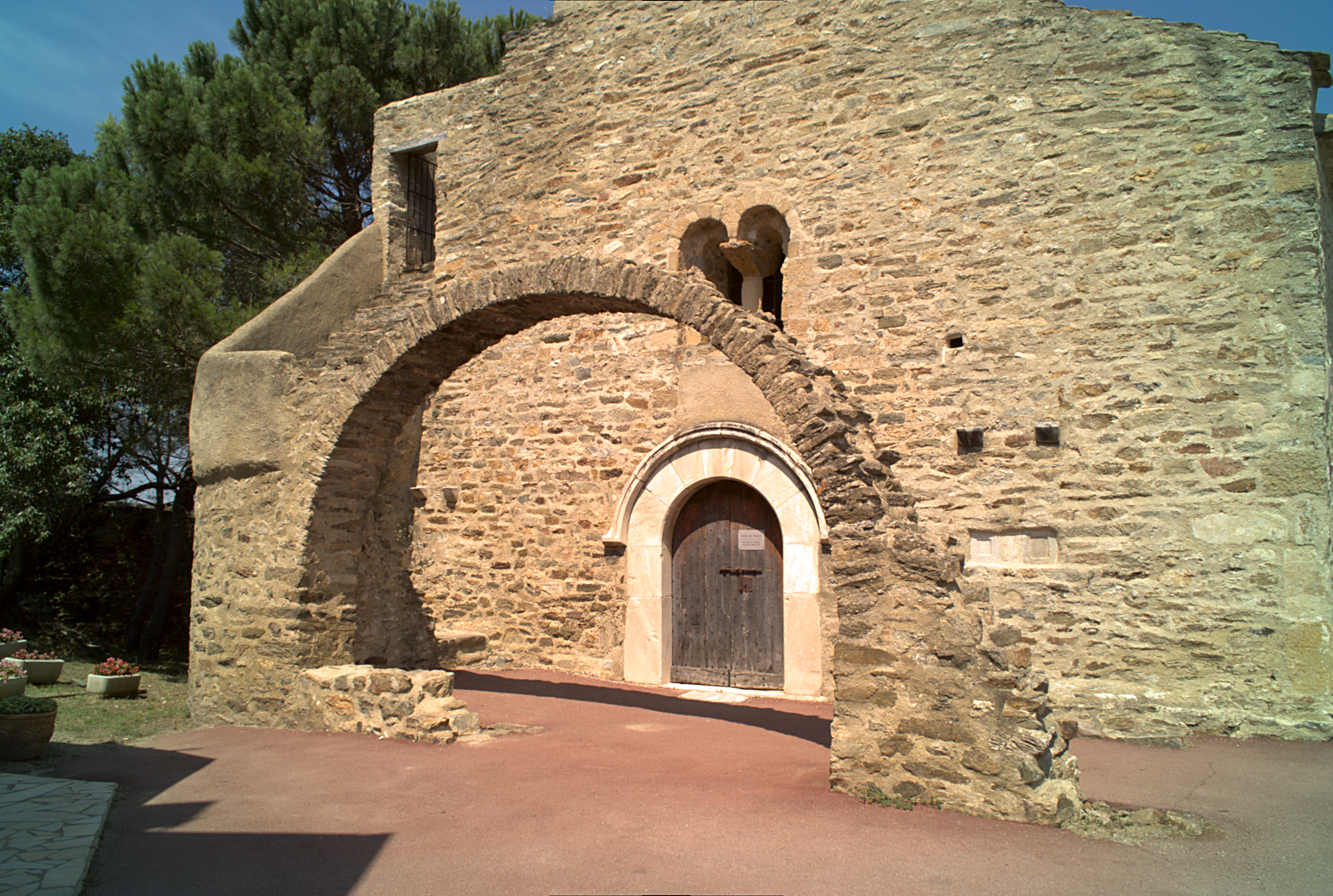 Entrée, Église Sainte-Marie de La Cluse Haute, Les Cluses (Pyrénées-Orientales, Languedoc-Roussillon, France)